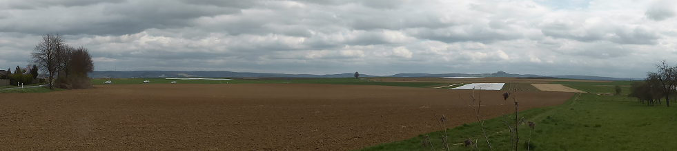 Panoramablick von Klein-Zimmern